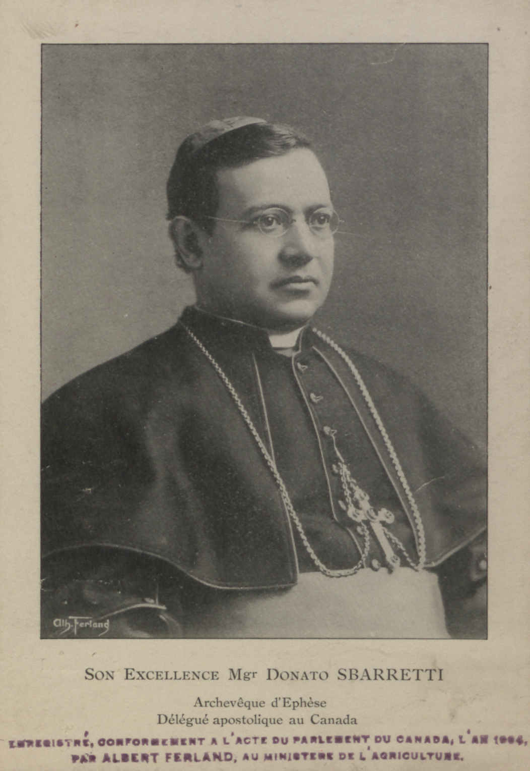 La Sainte Face de Notre Seigneur Jesus Christ.